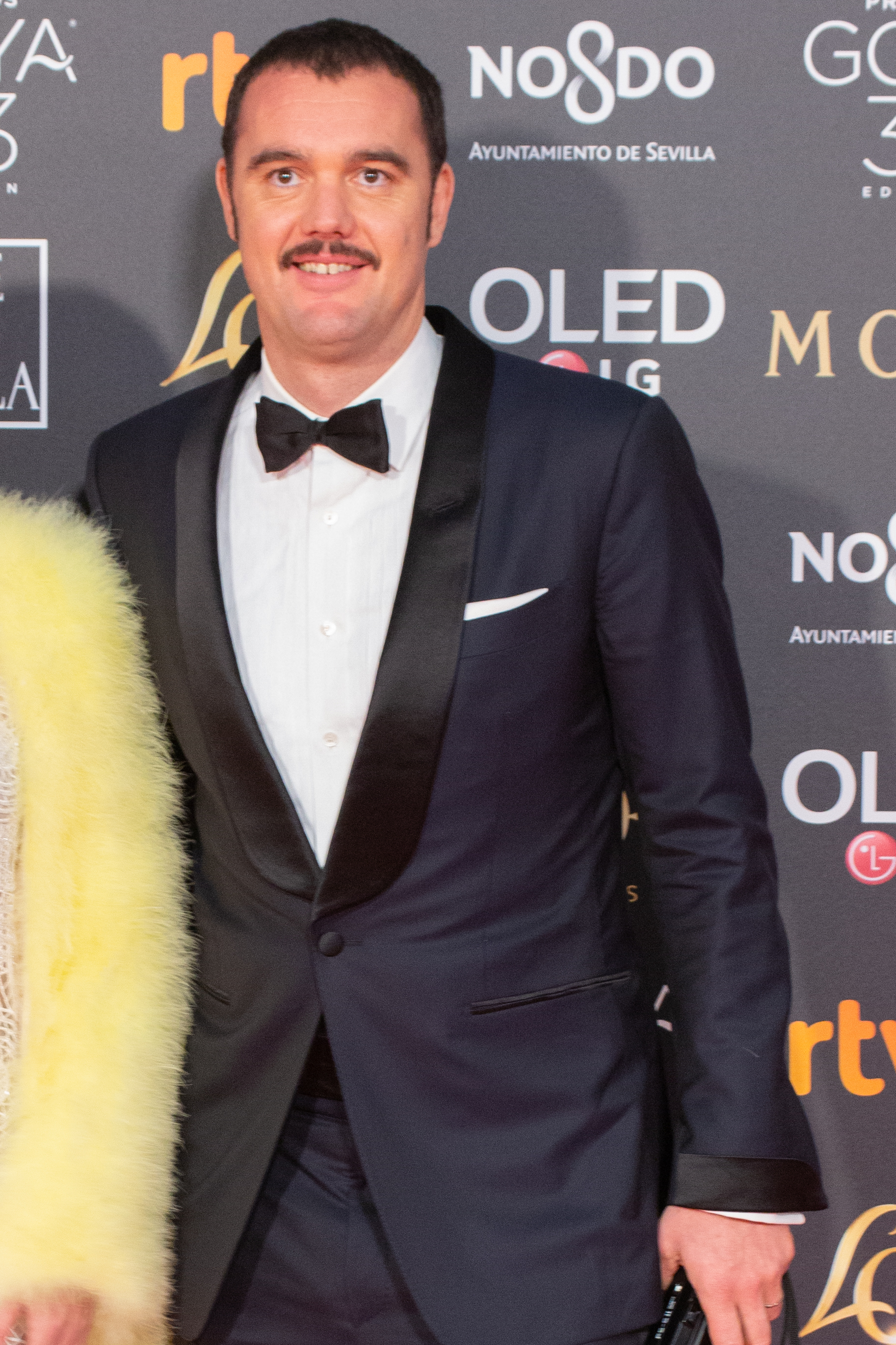 Eduard Grau en la alfombra roja de los premios Goya 2019. Nominado a la mejor dirección de fotografía por "Quién te cantará"